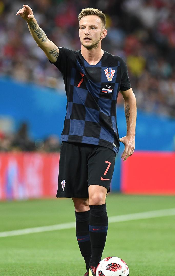 Сборная России заканчивает ЧМ-2018 с поднятой головой. Хорватия выходит в полуфинал